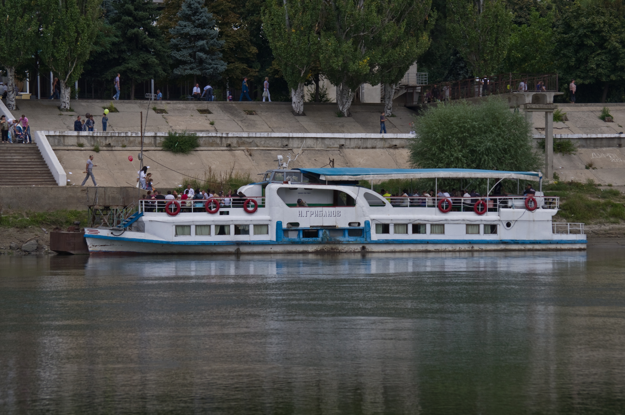 Прогулочное судно Н. Грибанов в Тирасполе на реке Днестр. Тип речных судов - Москвич